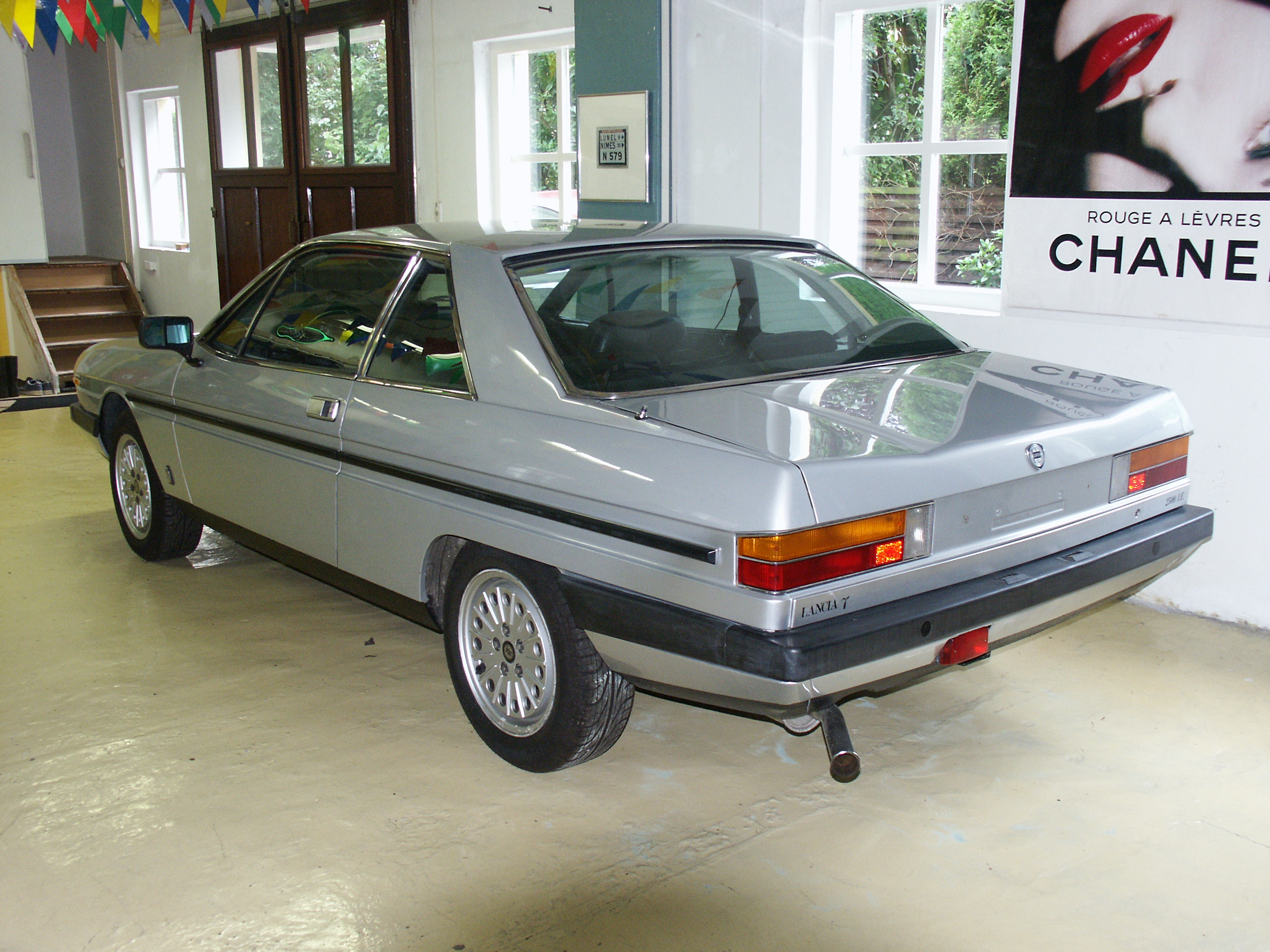 Gamma achtezijkant Eigen foto van eigen auto in eigen werkplaats